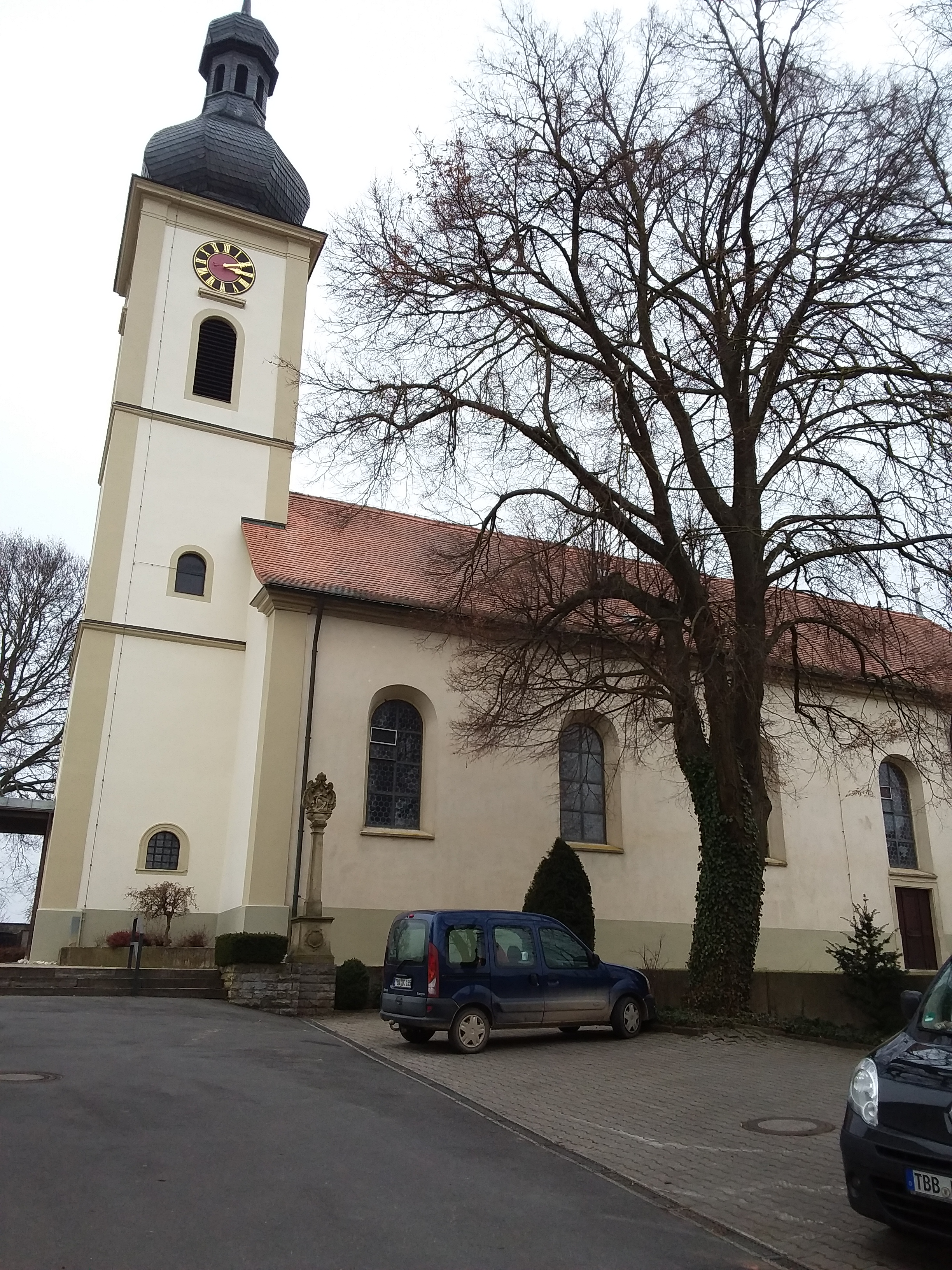 Am Kirchberg 4 (Vilchband 2017)